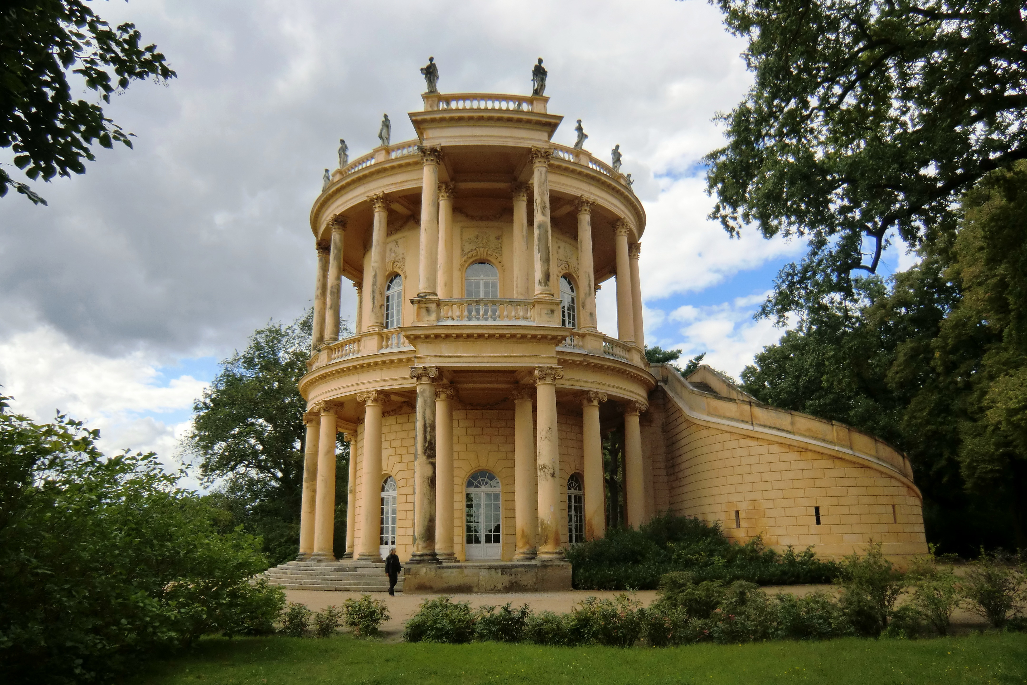 Belvedere auf dem Klausberg in Potsdam. Blick von Nordosten.